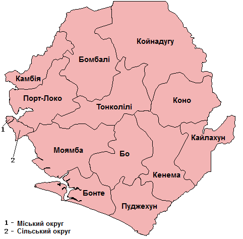 Округи Сьєрра-Леоне (адміністративний поділ 2 рівня)